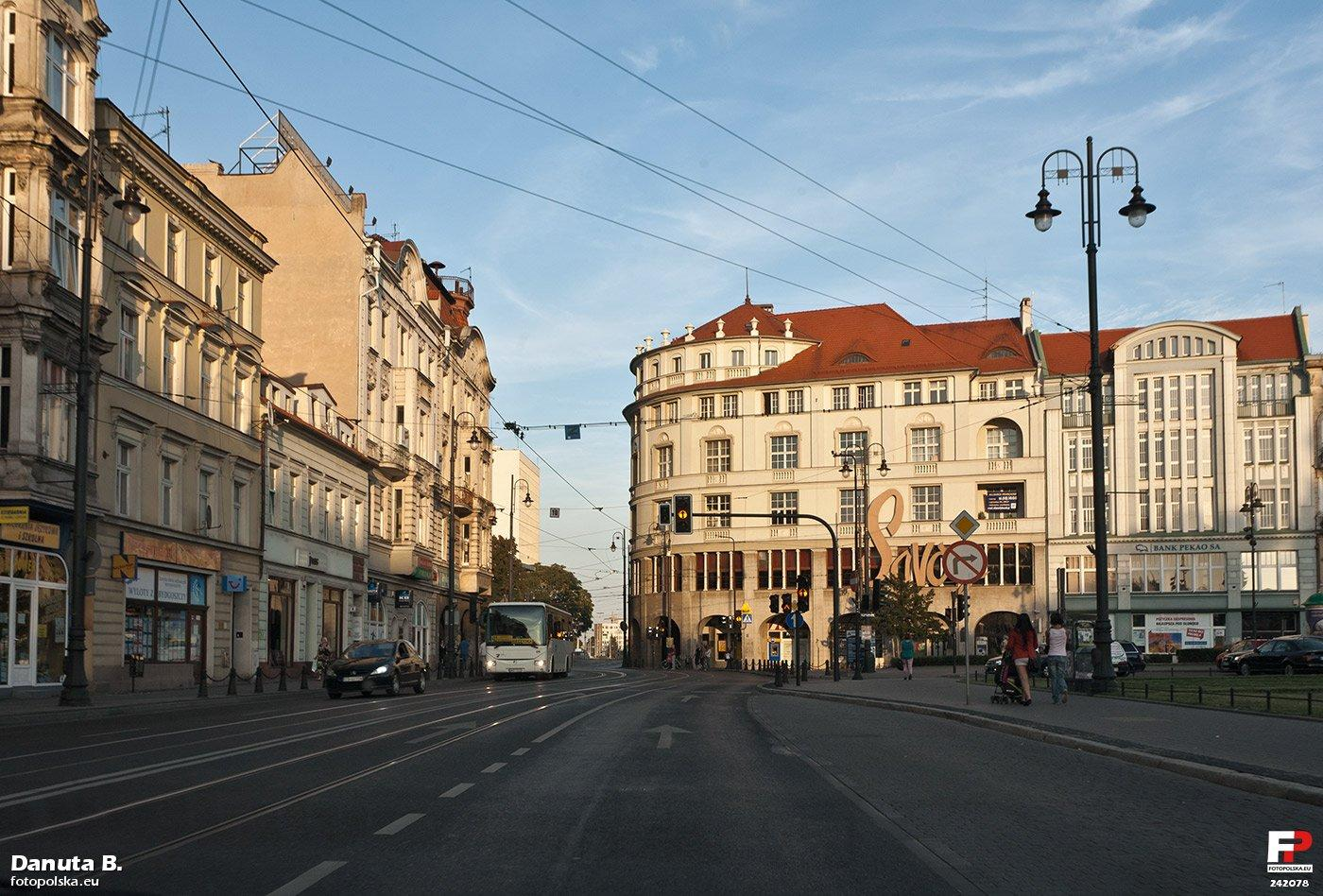 Prawdziwie wielkomiejska zabudowa. Lewa pierzeja przylega do ul. Focha, Narożny Savoy i bank z prawej to już Mostowa.